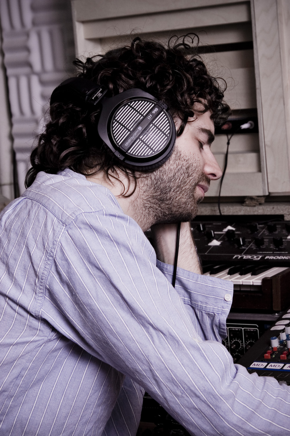 Lopazz (Stefan Eichinger) Album_shooting